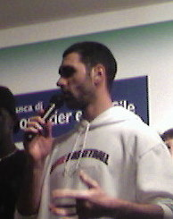 Fotografia di Matteo Soragna